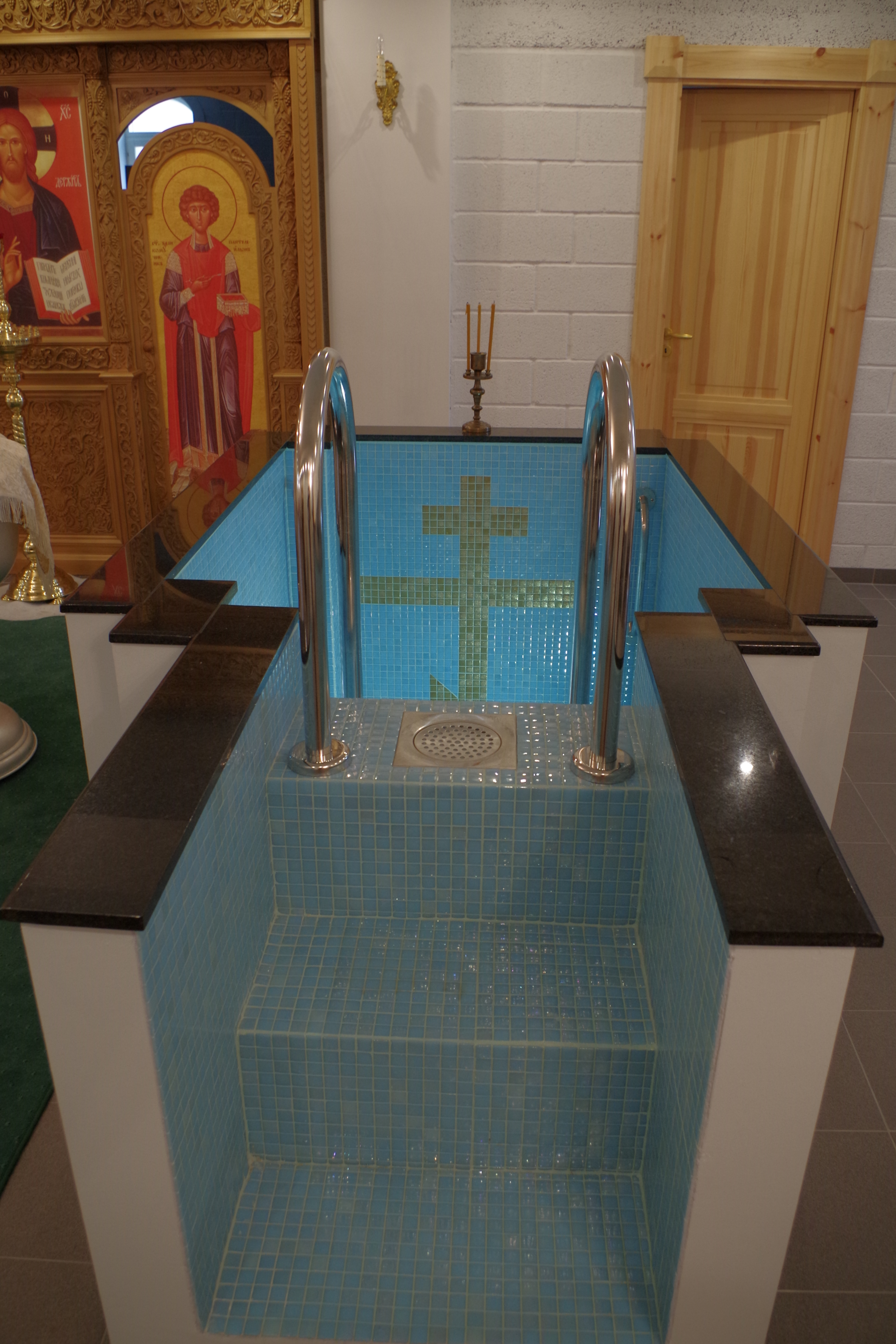 Baptisteerium Paldiski Sergi kirikus